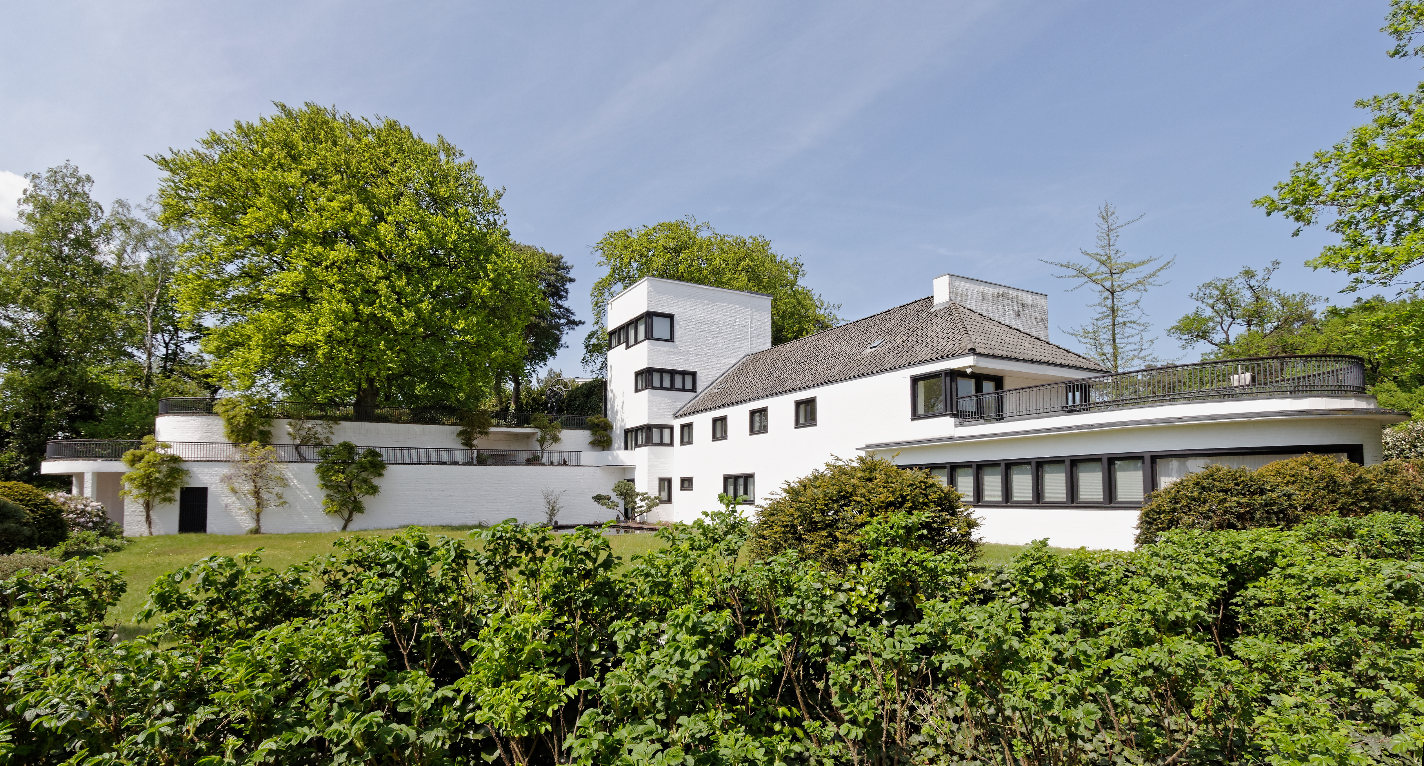 Hamburg-Blankenese, Villa Landhaus Michaelsen, SüdostseiteThis is a photograph of an architectural monument.